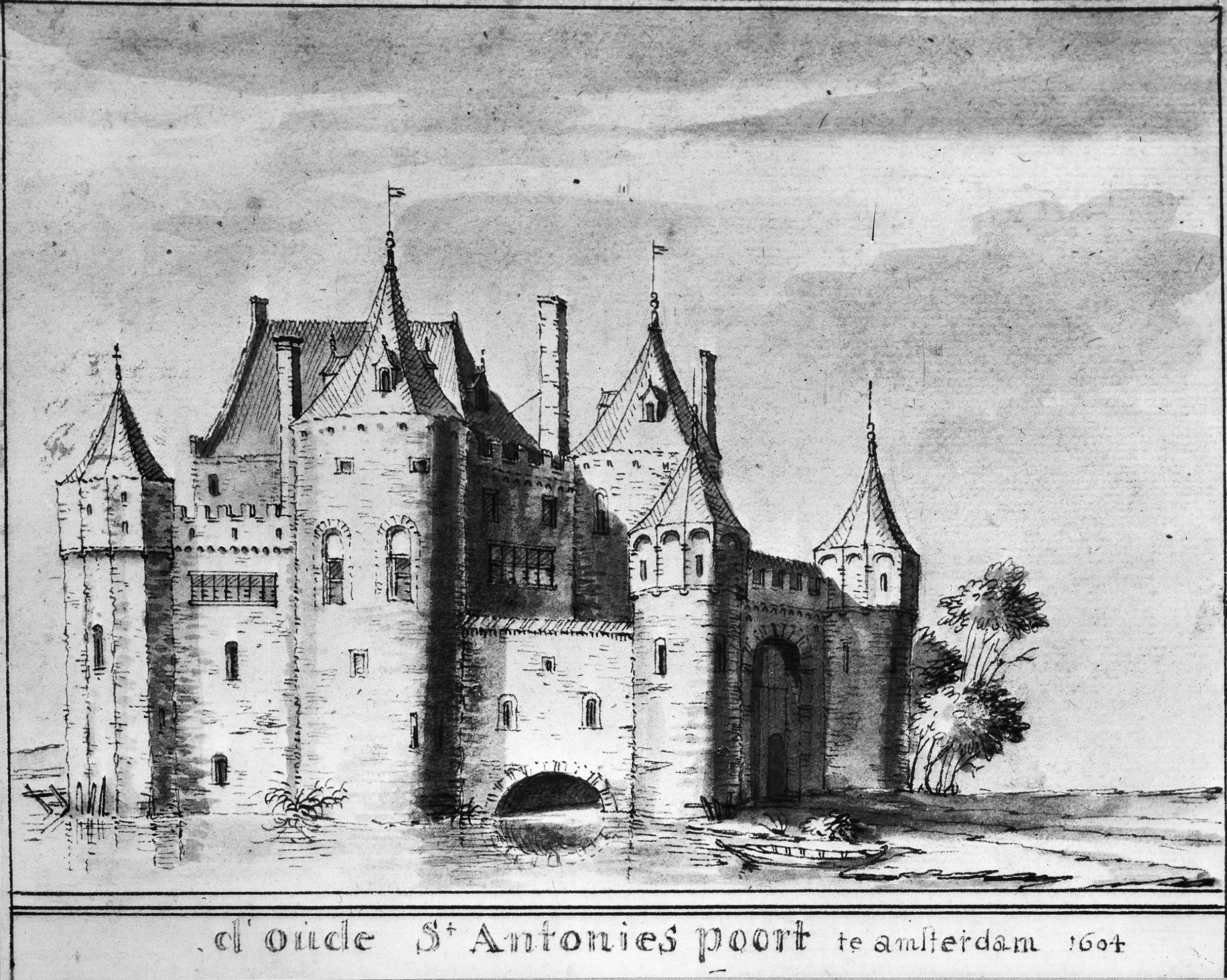 St.Antoniespoort: Oude in gemeente archief